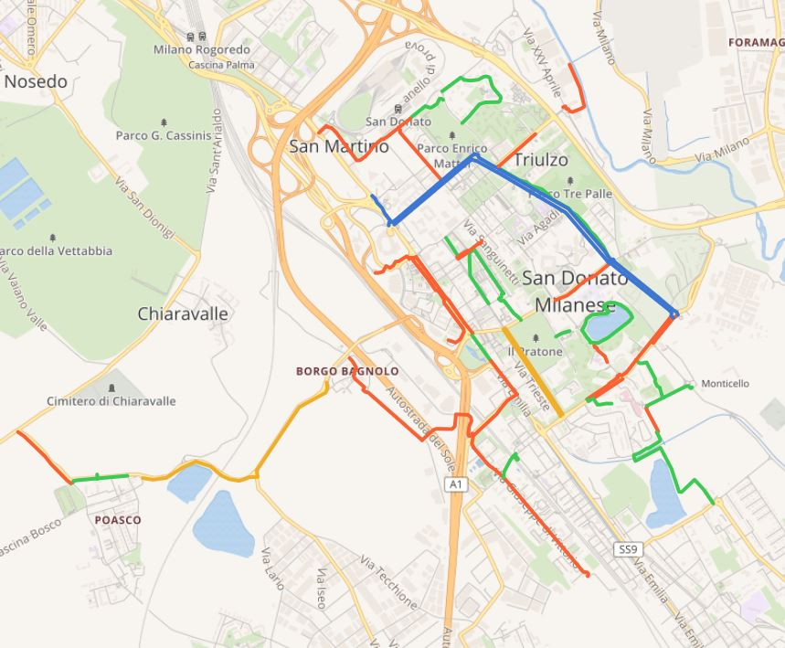 Piste ciclabili a San Donato Milanese (novembre 2019)